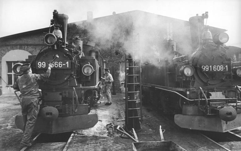 Mügeln, Wartung von Dampfloks (BR 99) ADN-ZB Grubitzsch 12.6.84 Bez. Leipzig: "Wilde Roberts" - Obwohl schon 60 bis 100 Jahre alt, dampfen sie noch immer - die Schmalspurloks auf dem Güterbahnhof Mügeln im Kreis Oschatz. Hier werden die "wilden Roberts" gerade für ihren Einsatz vorbereitet. 200.000 Tonnen Güter werden jährlich auf diesem Schmalspurgüterbahnhof, einem der größten in Europa, umgeschlagen. -siehe auch 1984-0612-1 und 2N